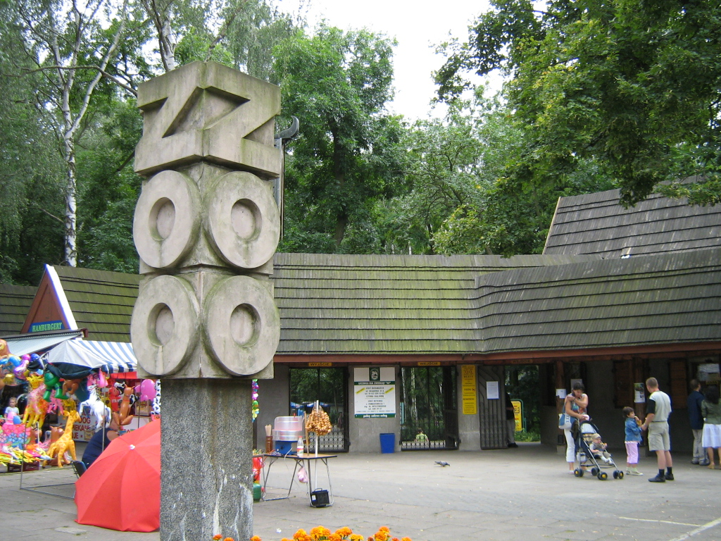 ZOO Łódź - wejście do ogrodu